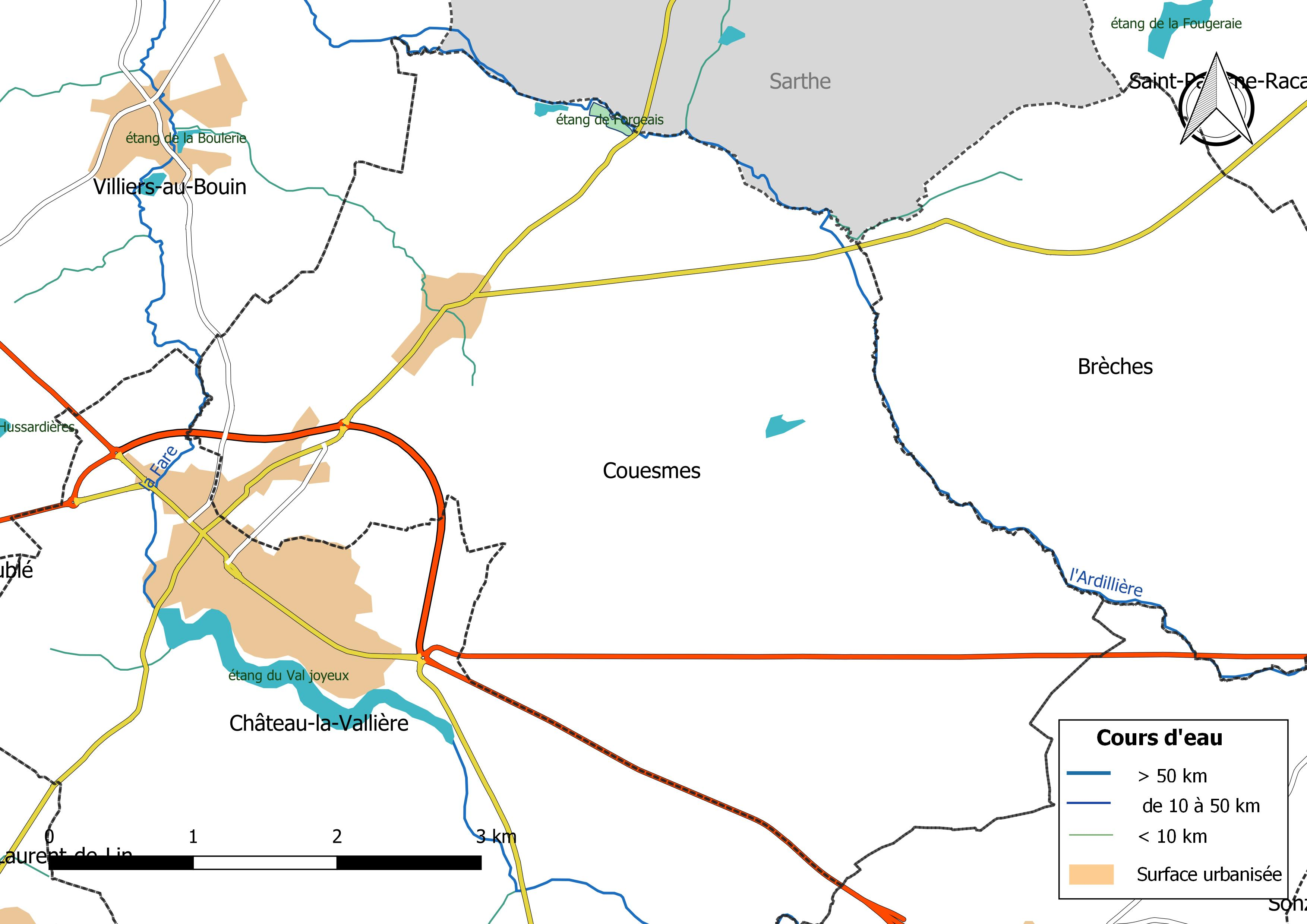 Carte du réseau hydrographique de la commune de Couesmes (France).